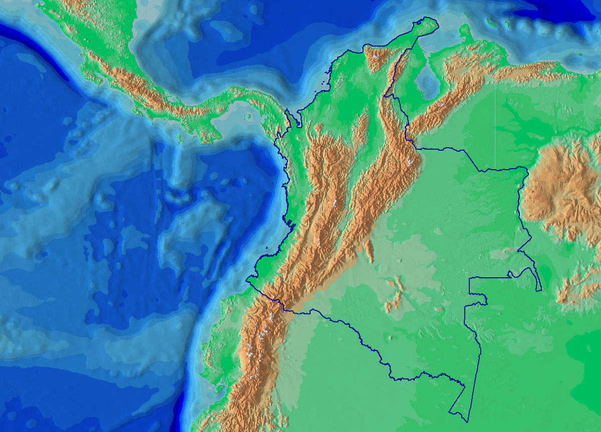 RElieve Colombia